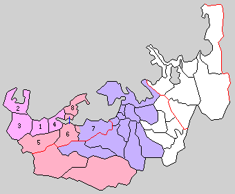 福井県大飯郡の町村制時点の町村。